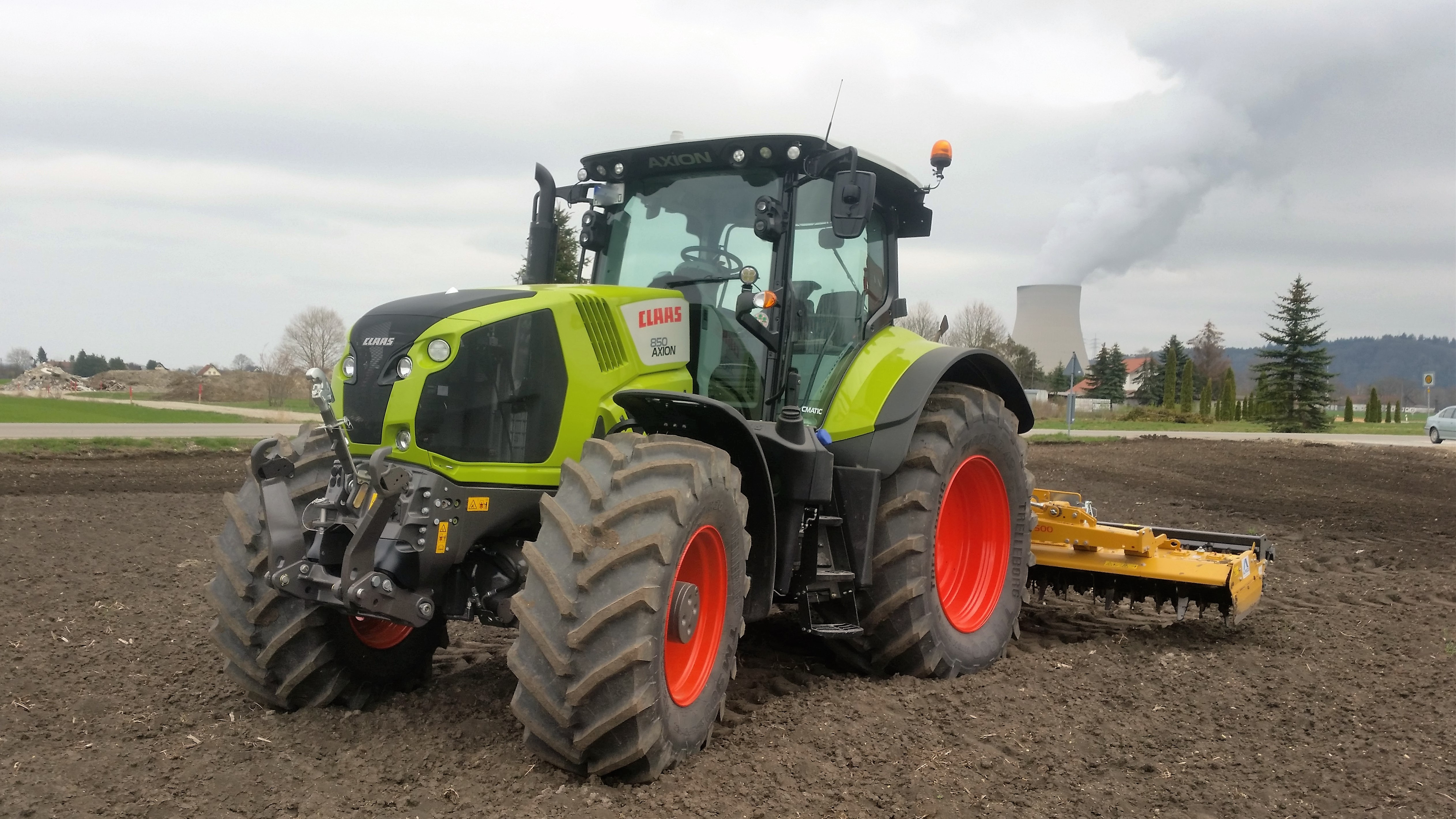 Claas Axion 850 mit Alpego 5m Kreiselegge